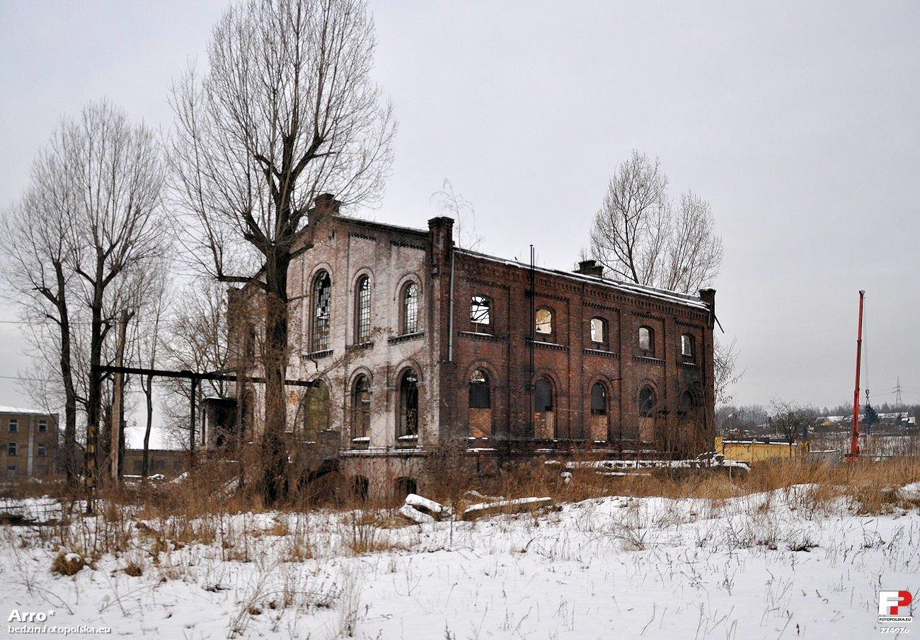 Budynek dawnego magazynu nieistniejącej dziś KWK Grodziec.